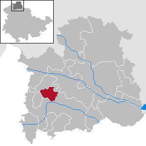 Gemeinde Kehmstedt in Thüringen, Landkreis Nordhausen